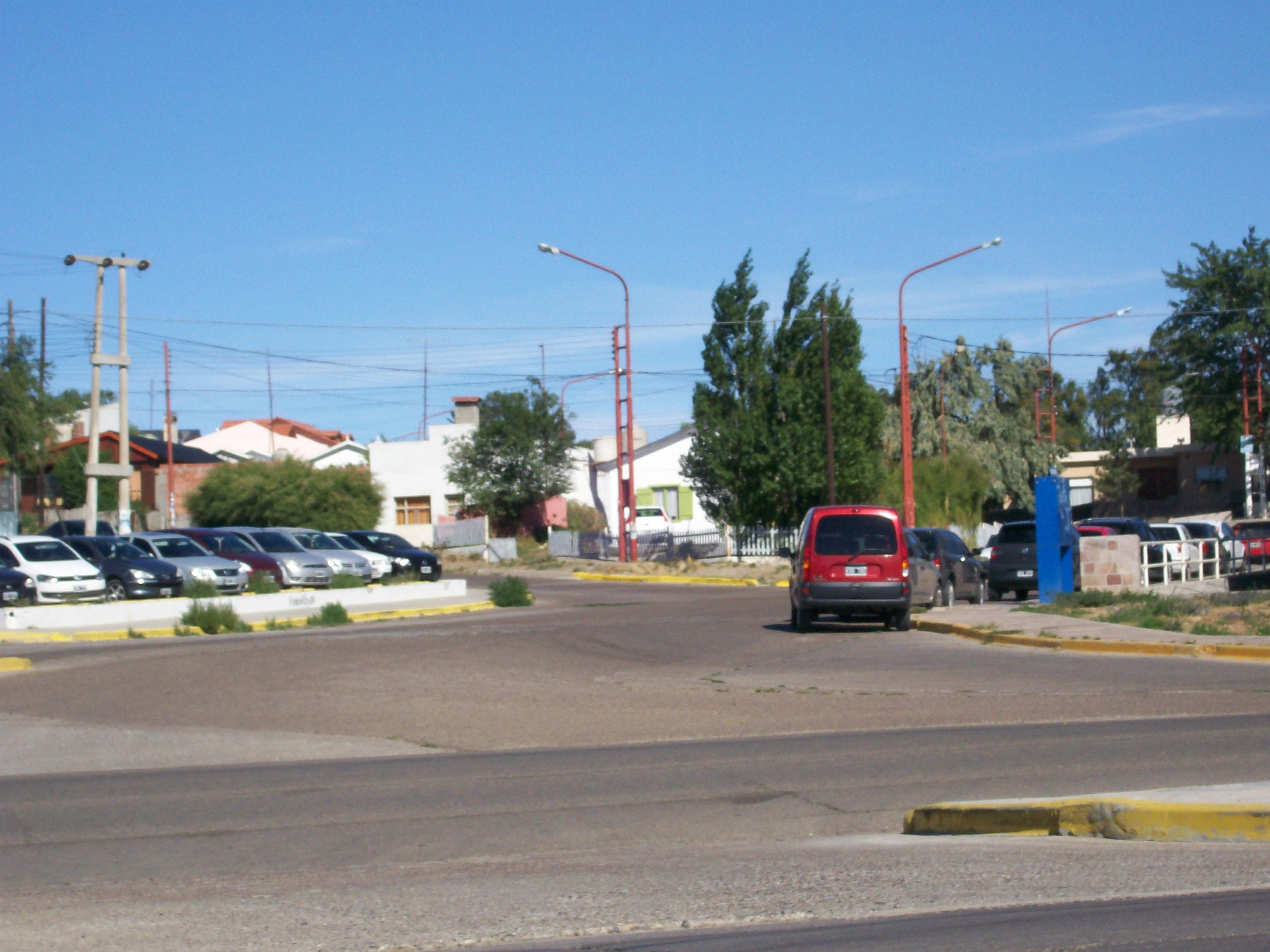 Vista a la calle, entrada sureste del barrio Parque